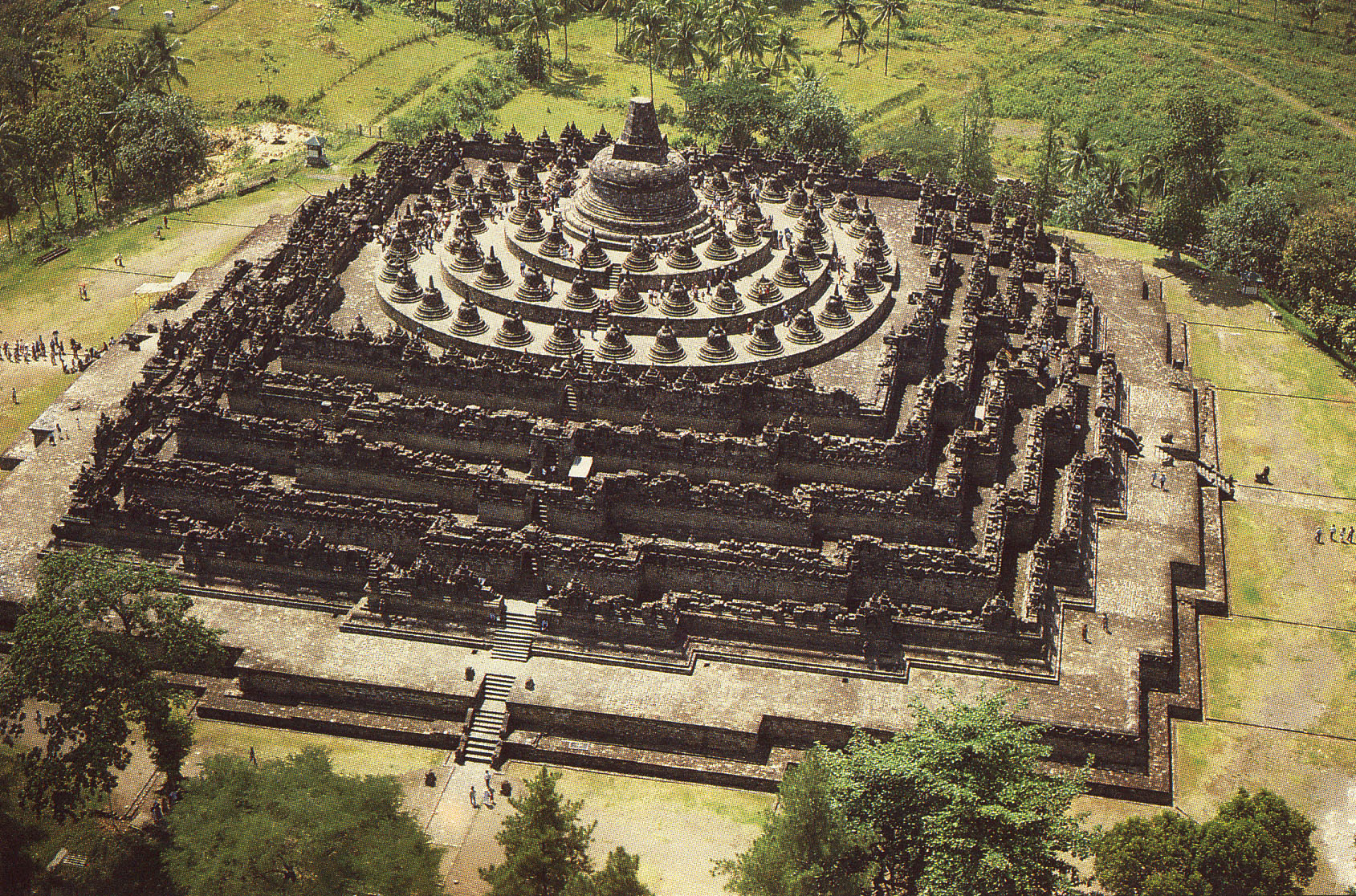 Panoramic views of Borobudur